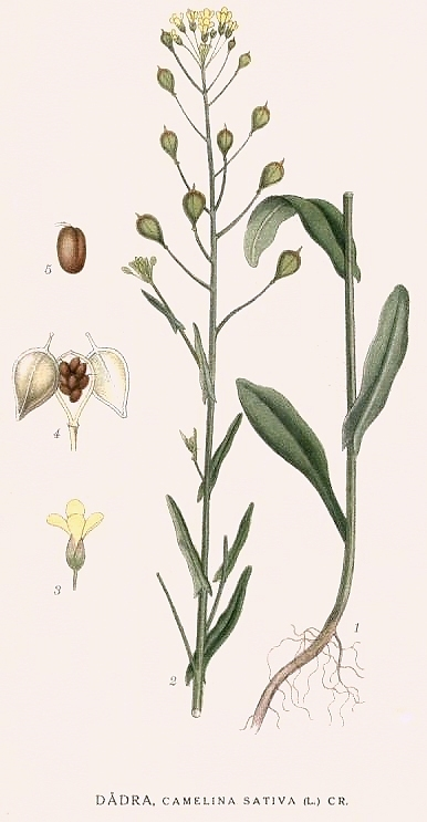 Camelina sativa (L.) Crantz Original Description Dådra, Camelina sativa (L.) Cr.